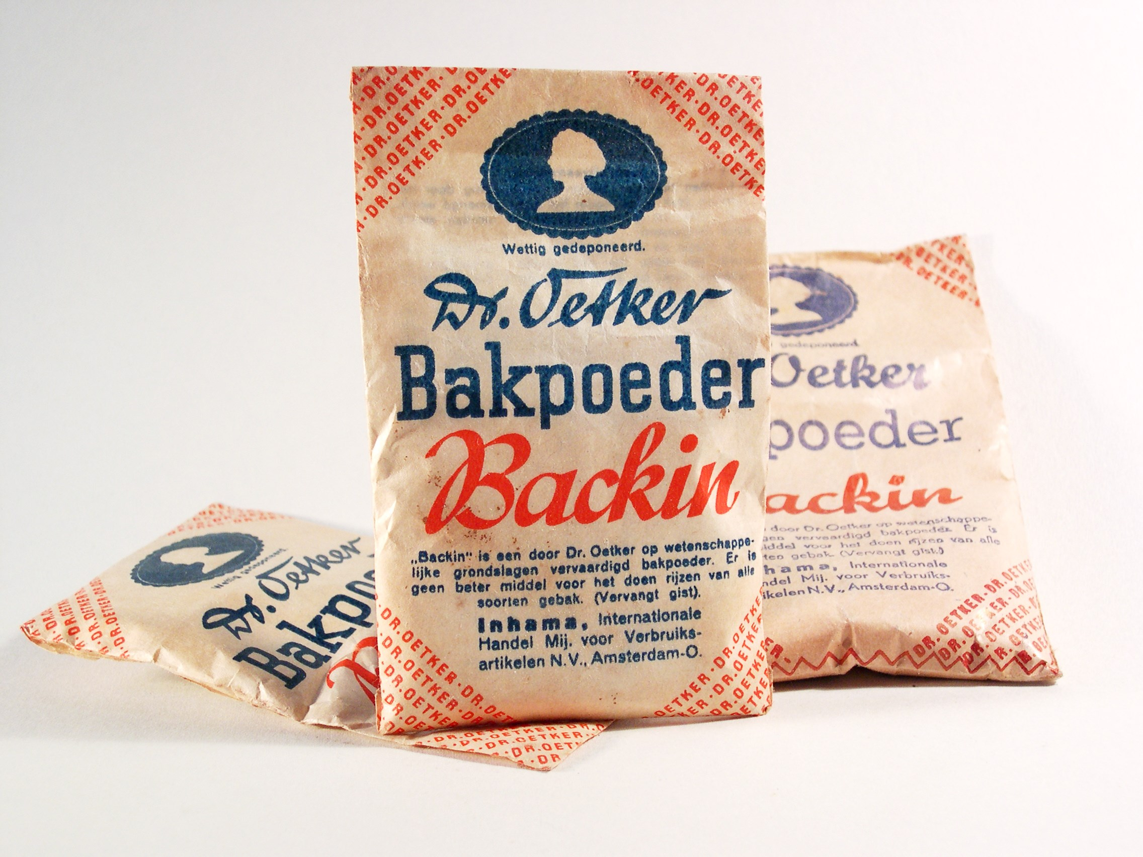 Dr. August Oetker KG, Wettig Gedeponeerd